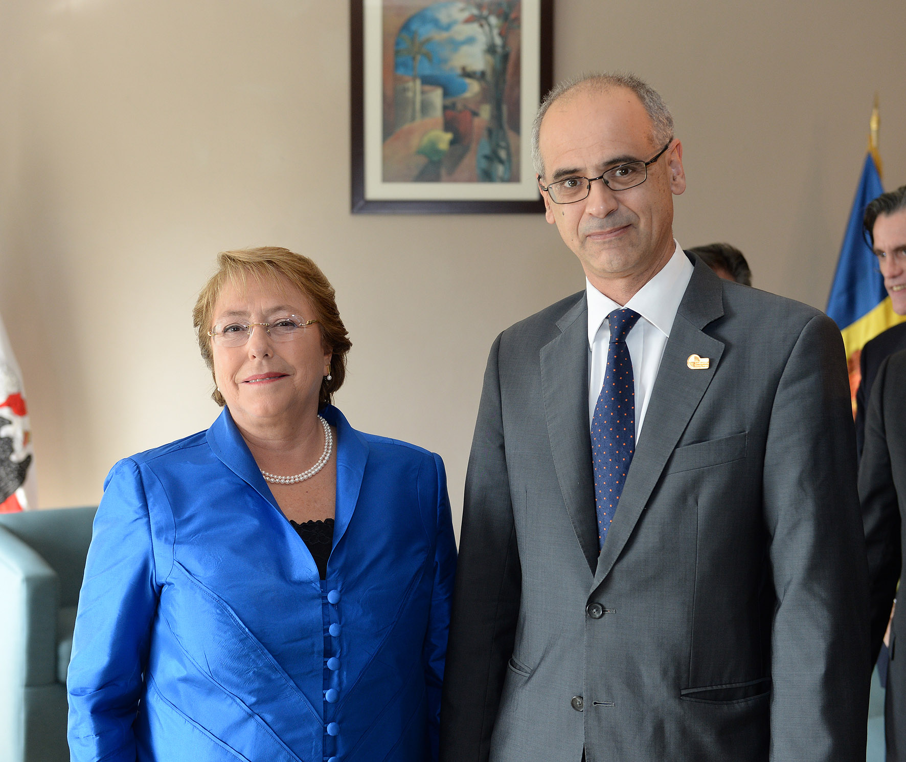 Gobierno de Chile